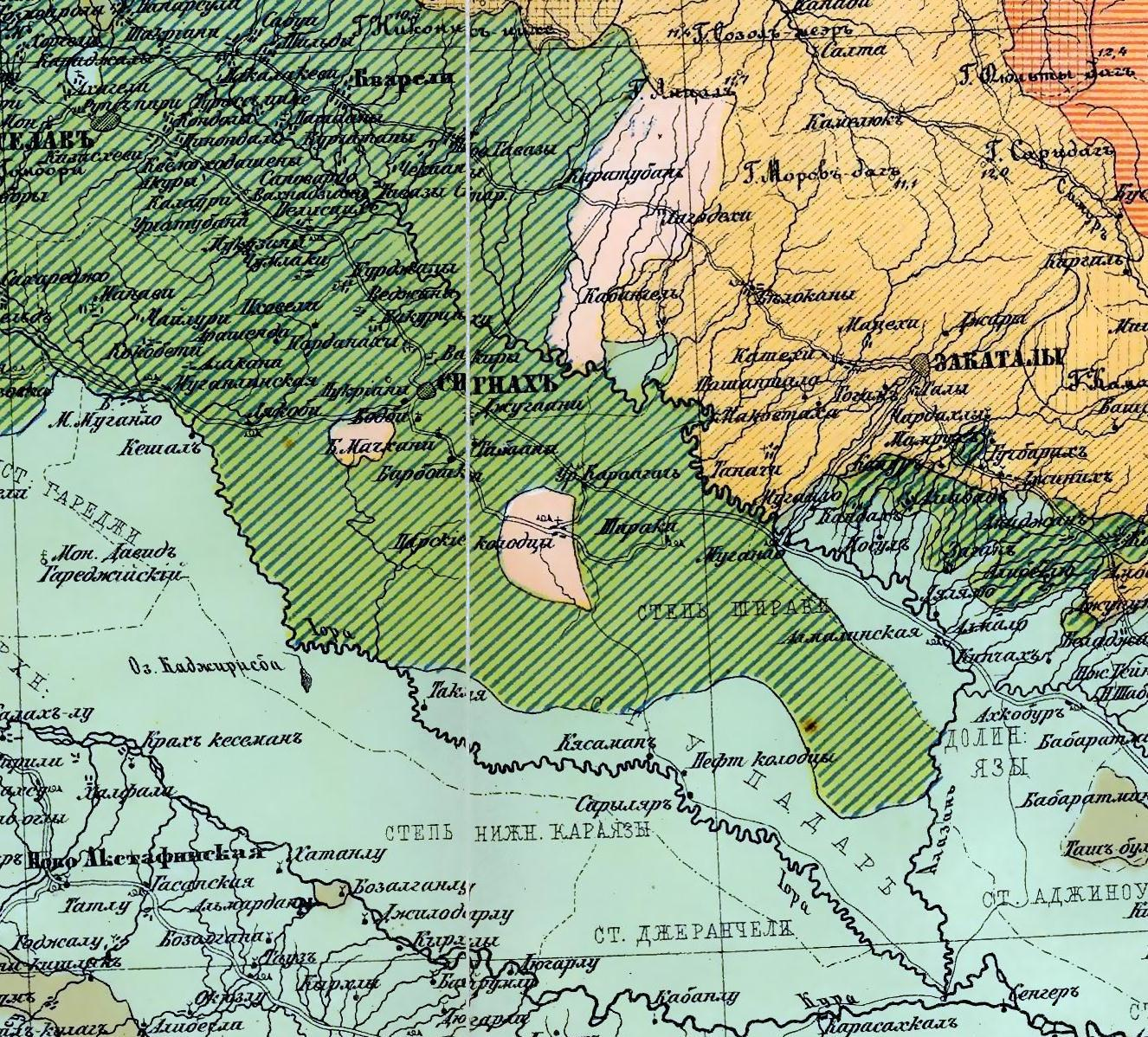 Этнографическая карта Сигнахского уезда, 1880 г. (Масштаб: 1:1080000).